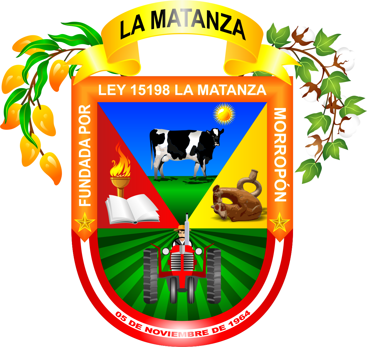 Distrito de La Matanza - Provincia de Morropón - Región Piura